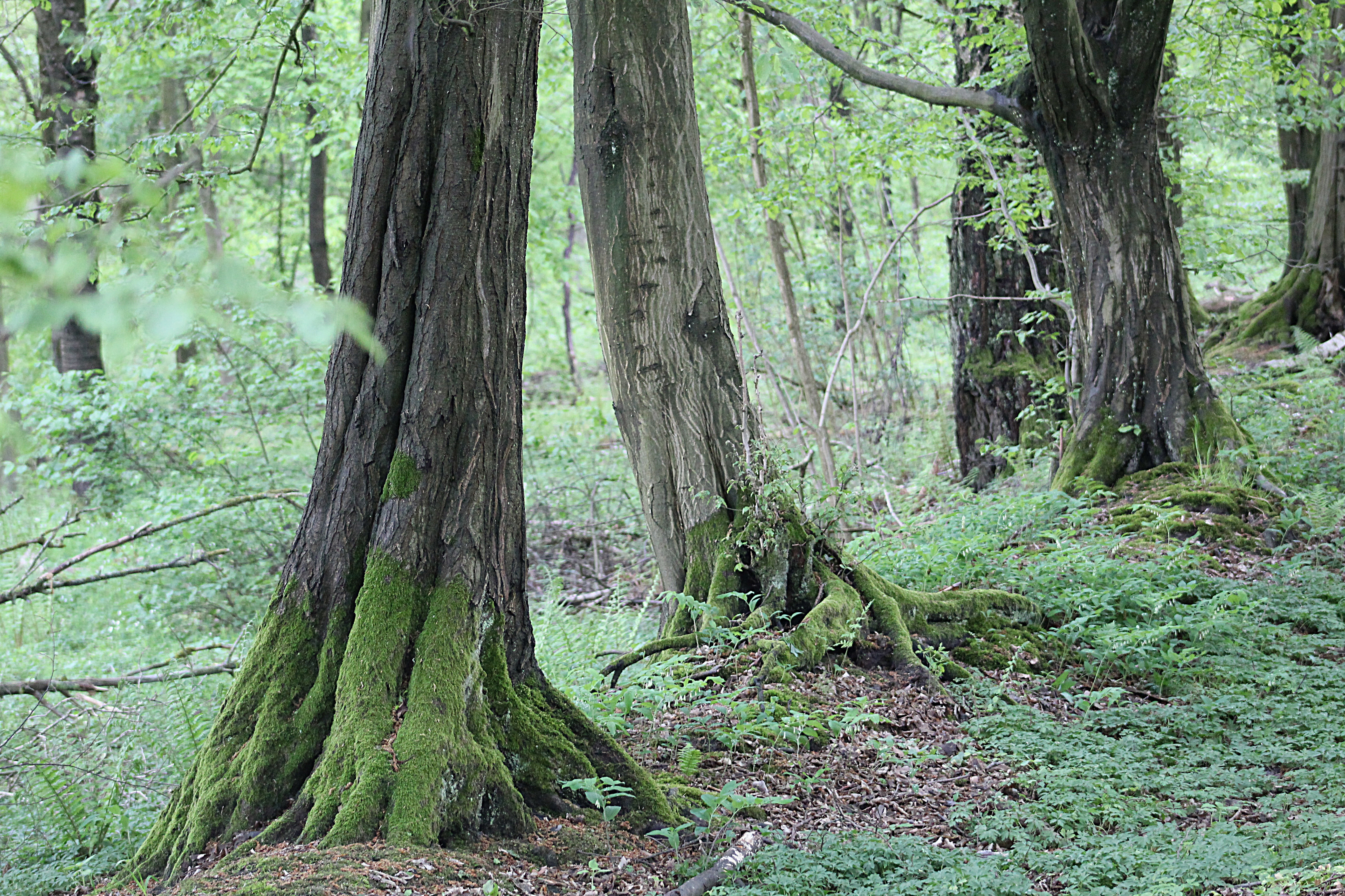 Um Wege in Feldern und Wäldern, oft entlang von Wällen, oder Knicks zu markieren pflanzte man widerstandsfähige Bäume in Reihe. Wie bei Alleen. Ein natürlicher Wegweiser, wohin führt der Weg? Auf jeden Fall ist ein Weg mit Bäumen und Natur an der Seite viel leichter zu gehen, wie ich festgestellt habe. Zudem Speichern die Bäume CO².